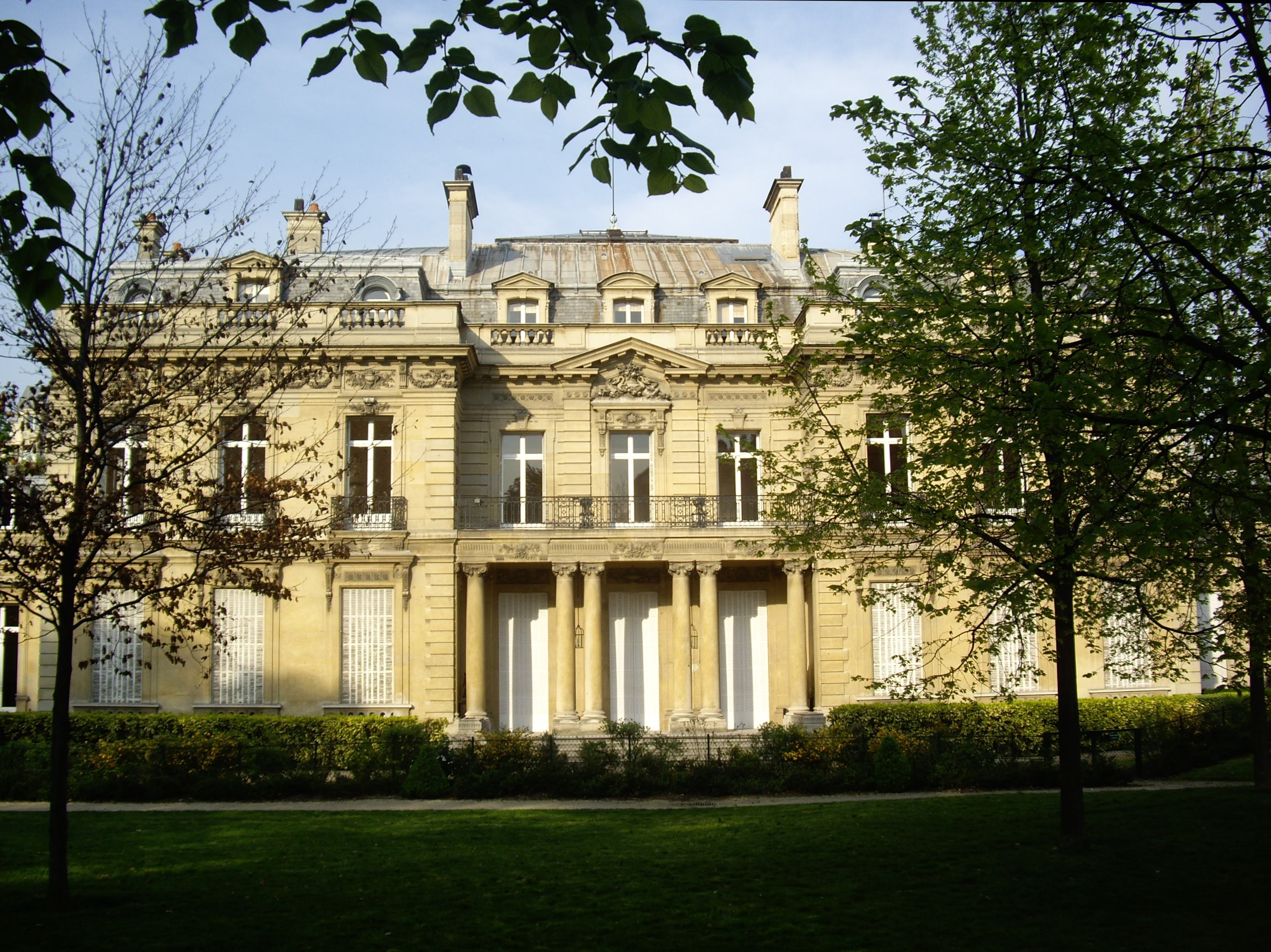 Hôtel Salomon de Rothschild, Paris 8e. Façade côté jardin.